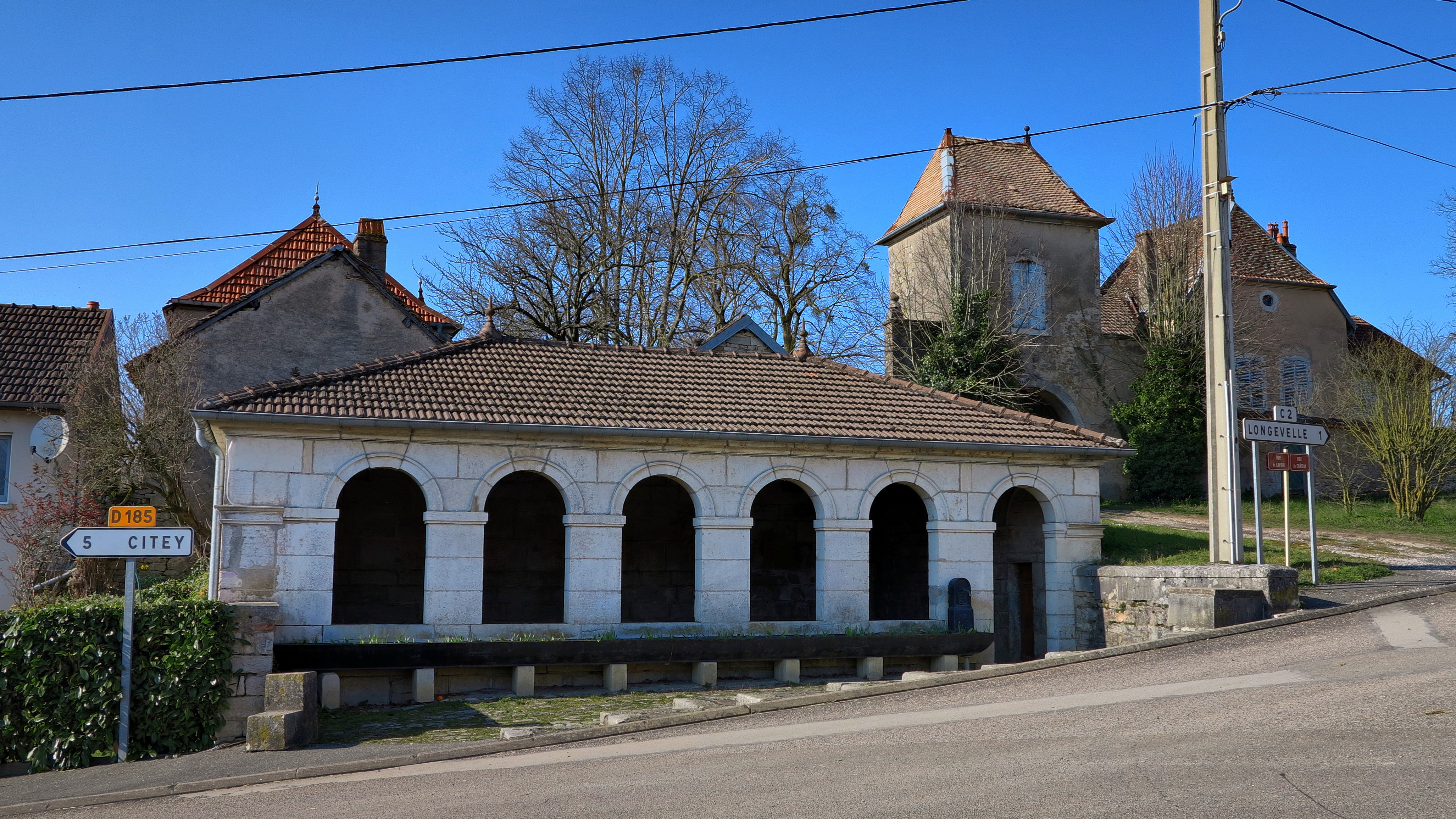 Le lavoir-abreuvoir